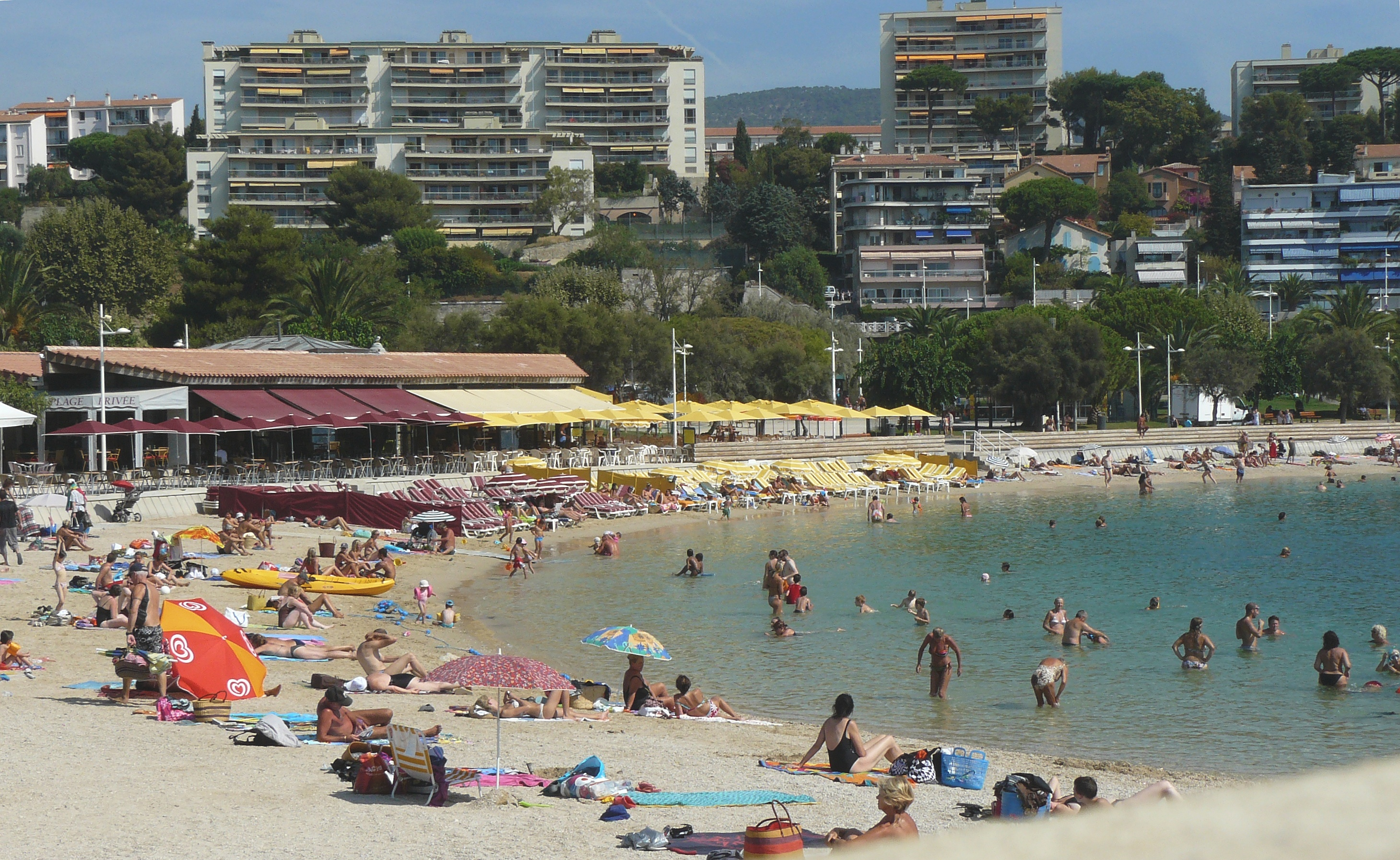 Une des trois plages dans des anses aménagée au quartier du Mourillon. Des digues ont été construites et le sable apporté, équipement de restaurants, transats, jeux etc. Plus à l'est, marina et école de voile.